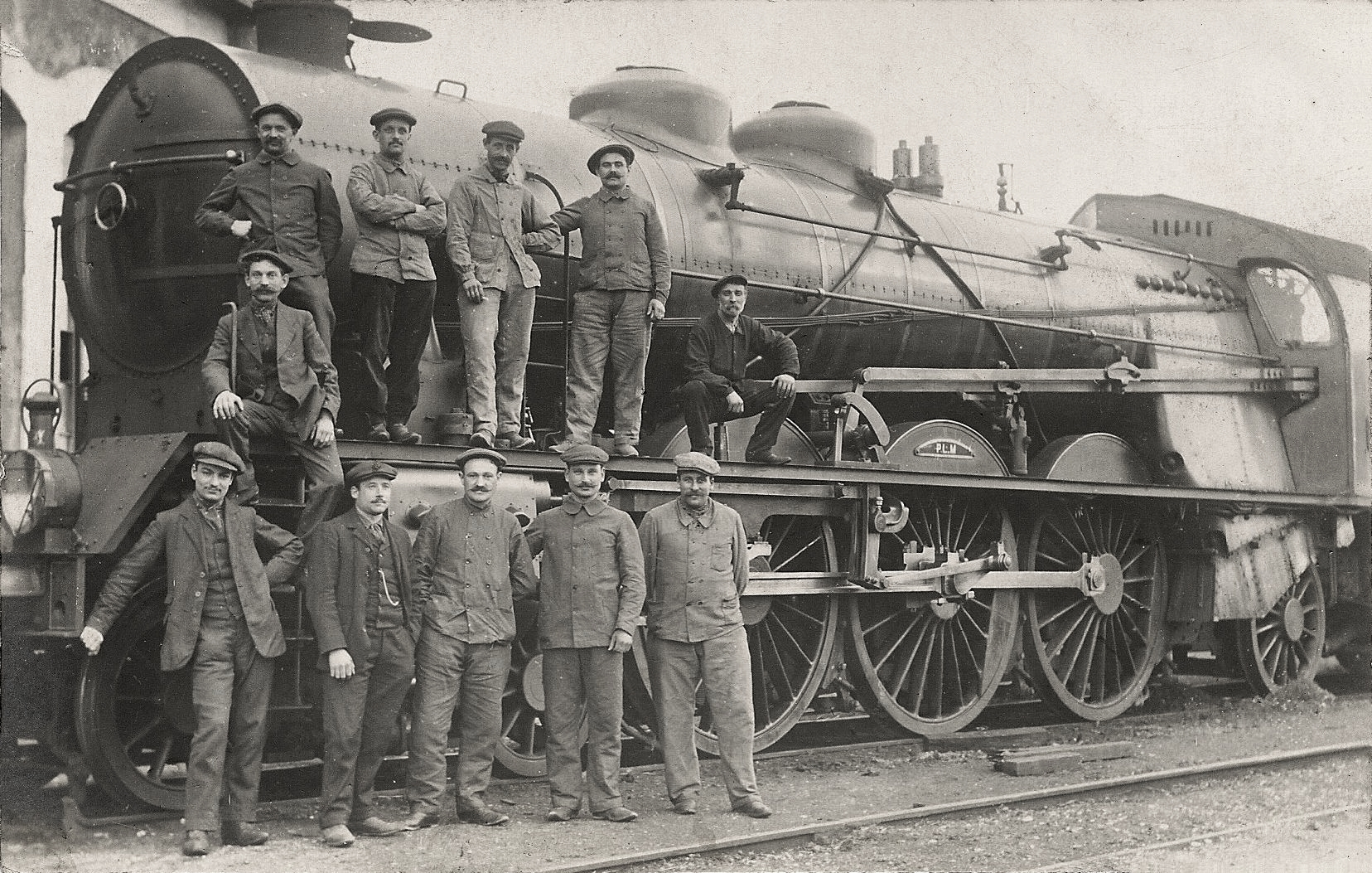 Carte postale ancienne d'un groupe de cheminots du PLM devant une locomotive Pacific.